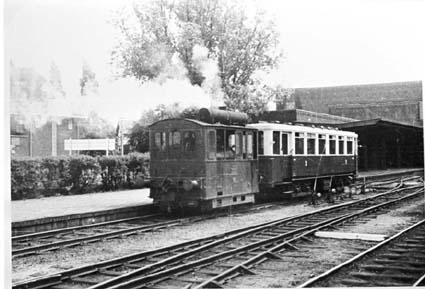 Het tramstation te Naarden-Bussum, gezien in de richting van het stationsgebouw van Naarden-Bussum, vanaf het eerste perron, met stoomloc nr. 16 van de Gooise Tram met een rijtuig van de serie 50-59 (ca. 1940) wegens ouderdom PD